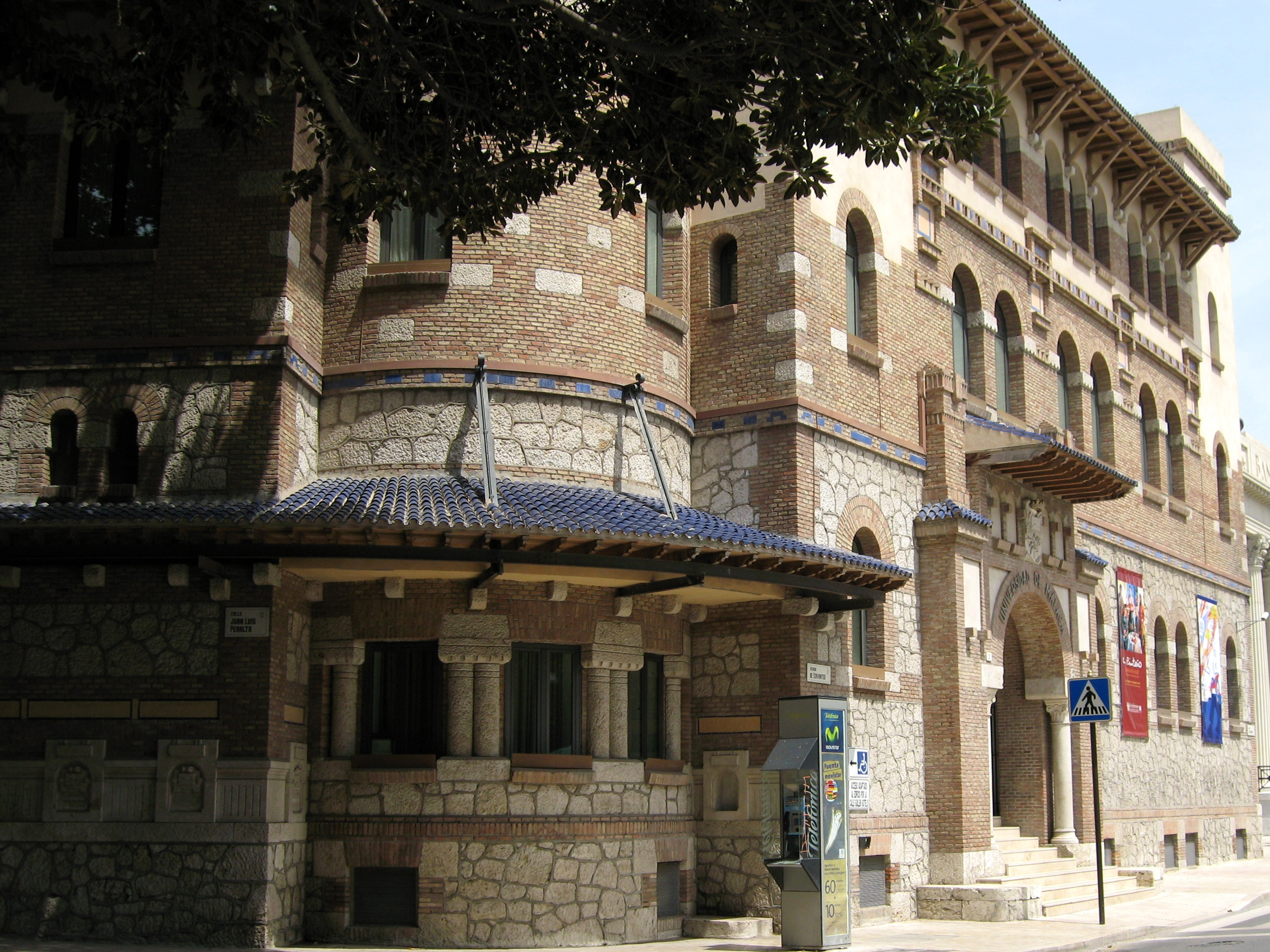 Universität von Málaga, Andalusien, Spanien